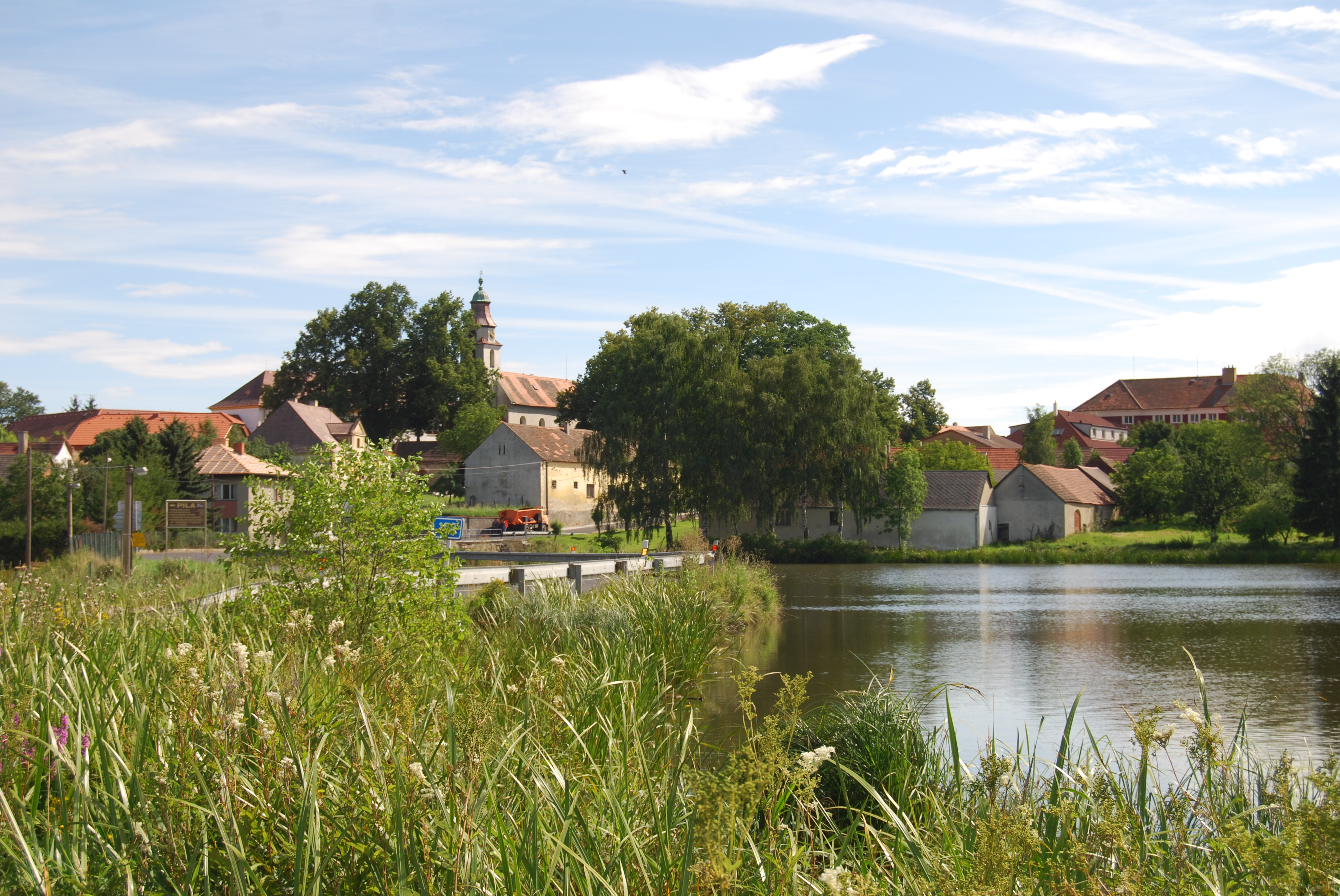 Pohled na obec z příjezdové komunikace od Votic. Obec Jankov v okrese Benešov, kraj Středočeský. Česká republika.